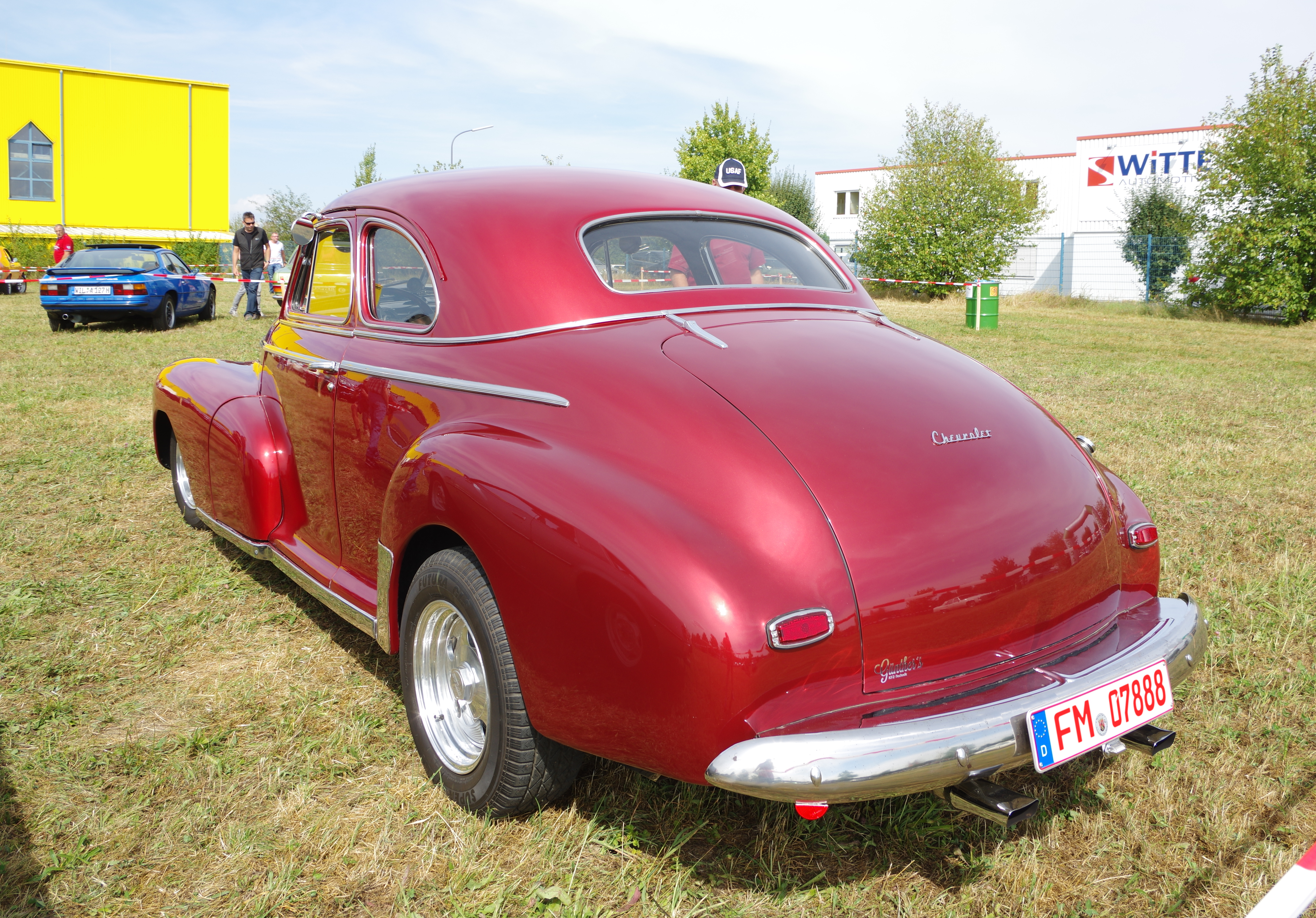 Chevrolet Fleetmaster , Bitburg Classic 2016, Das Nummernschild ist verfälscht!